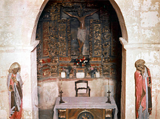 Santo Cristo de Reveche, San Juan y la Magdalena. Gumiel de Izán, Burgos, España